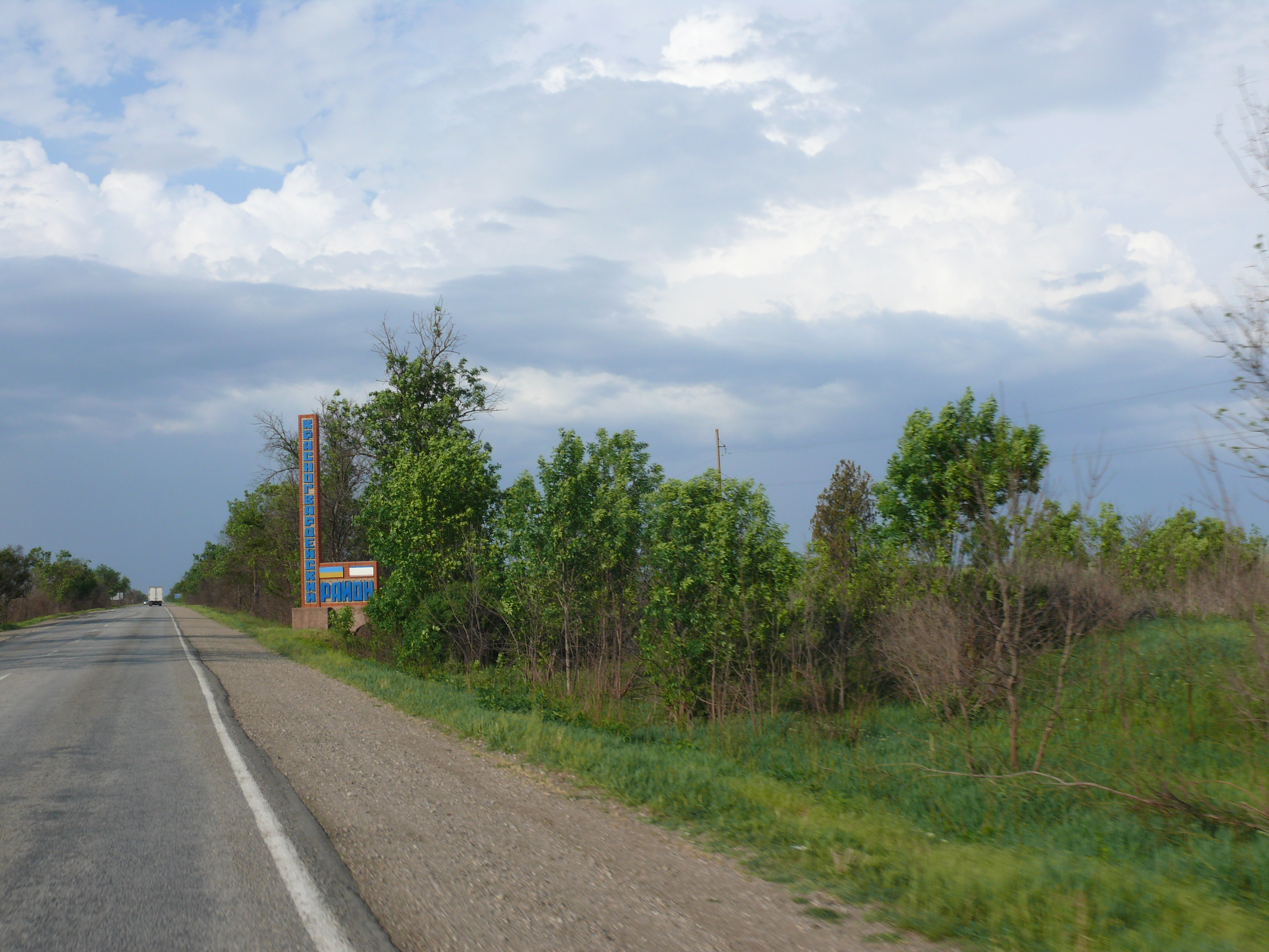 Знак на въезде в Красногвардейский район Крыма